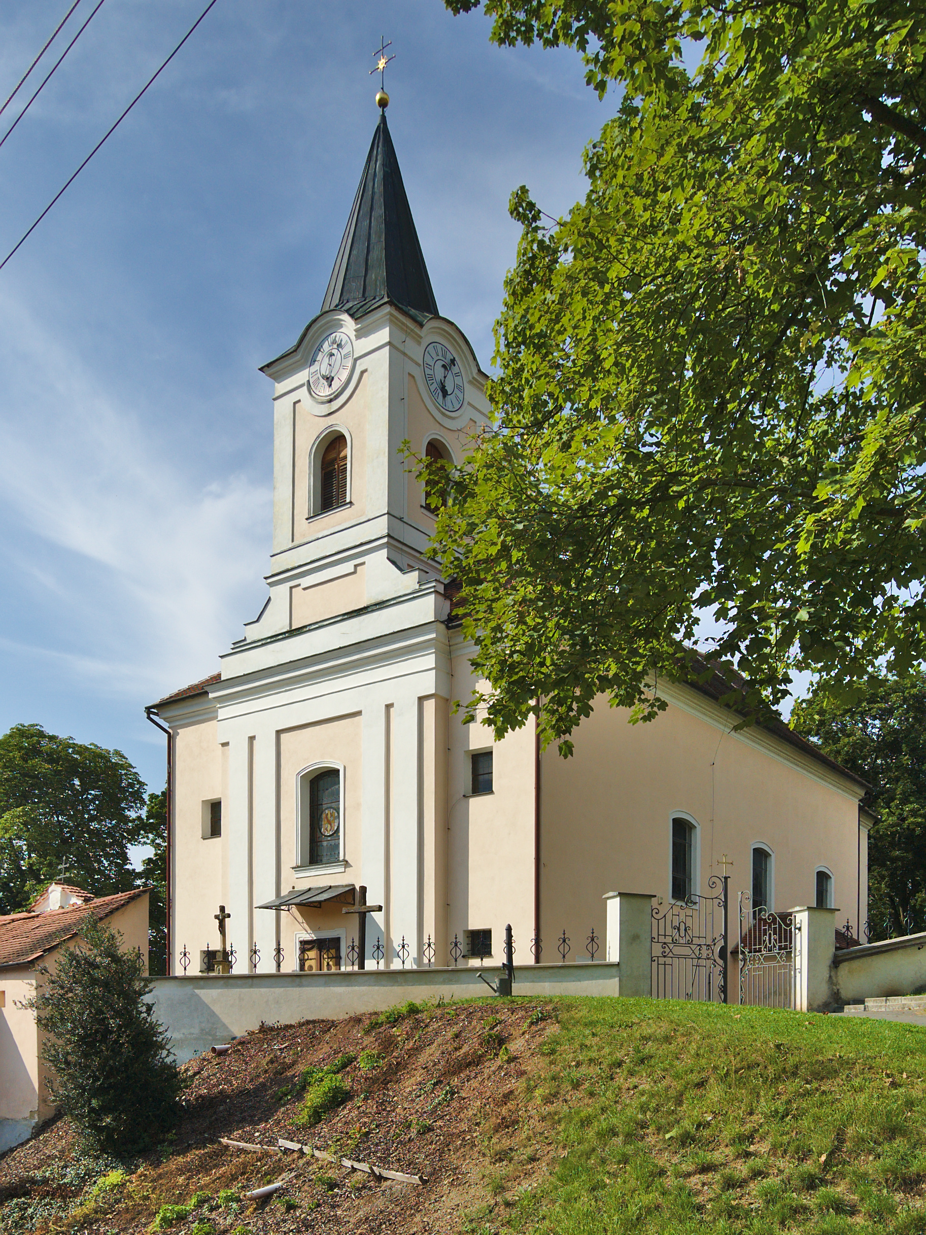 Kostel svatého Marka, Knínice u Boskovic, okres Blansko